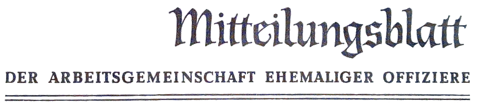 Mitteilungsblatt der AeO